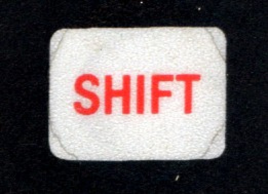 SHIFT-Taste des ZX81 mit Brüchen durch den Gebrauch